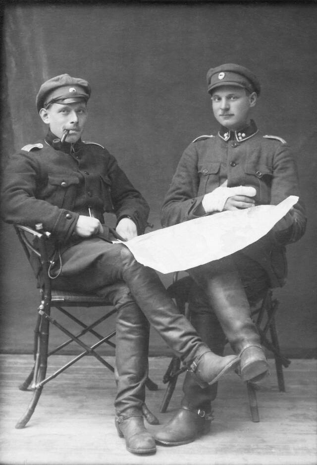 Sooomusrongide Diviisi operatiivadjutant lipnik Aleksander Tilger ja diviisi ülema abi alamkapten Arnold Hinnom.